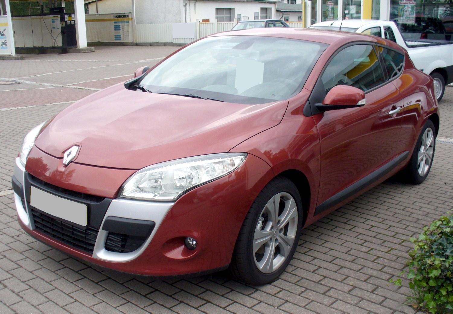 Renault Mégane III Coupé